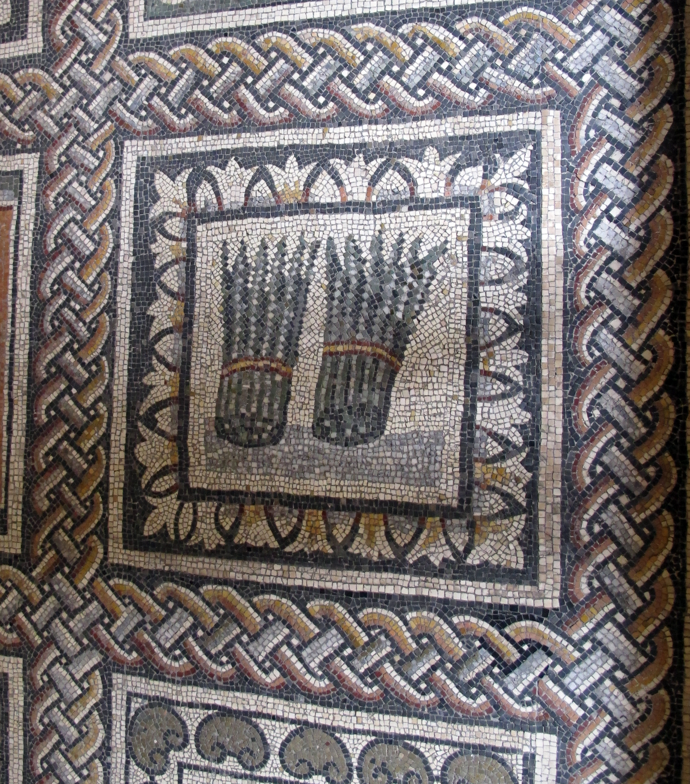 Arte romana nei Musei Vaticani